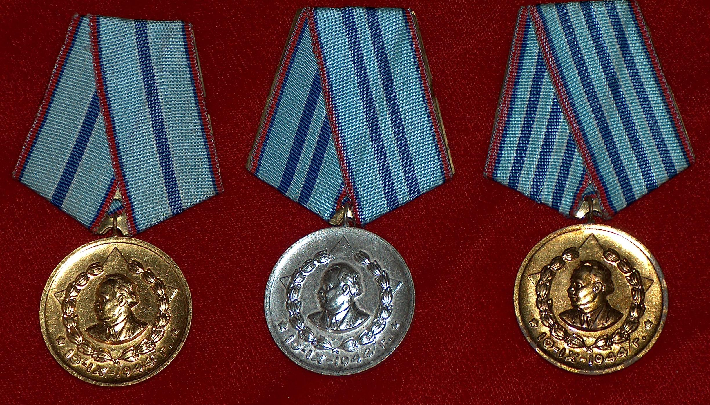 Комплект медали за прослужено време в Комитета за Държавна Сигурност (КДС), тези медали са раздавани на висши офицери от КДС във периода 1965-1969 година. През 1969г. КДС се влива в МВР и служителите на ДС са награждавани с медали на Министерството на Вътрешните Работи (МВР)